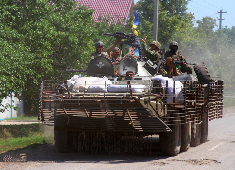 Підрозділи сил АТО.